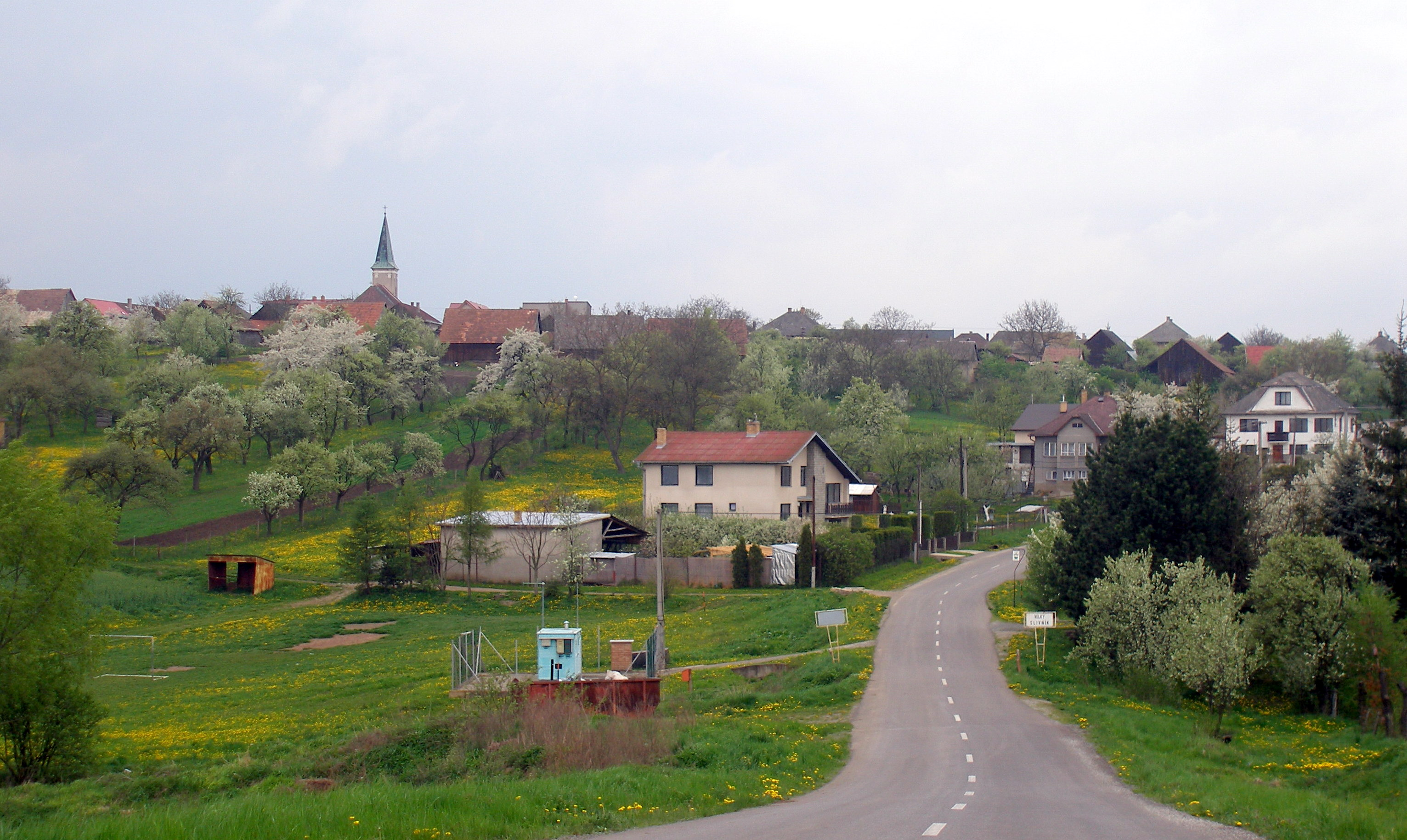 Obec Veľký Slivník okres Prešov región Šariš